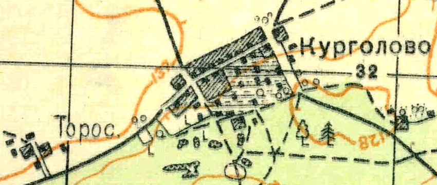 Топографическая карта Ленинградской области, квадрат О-35-24-А-в (Торосово), деревня Курголово